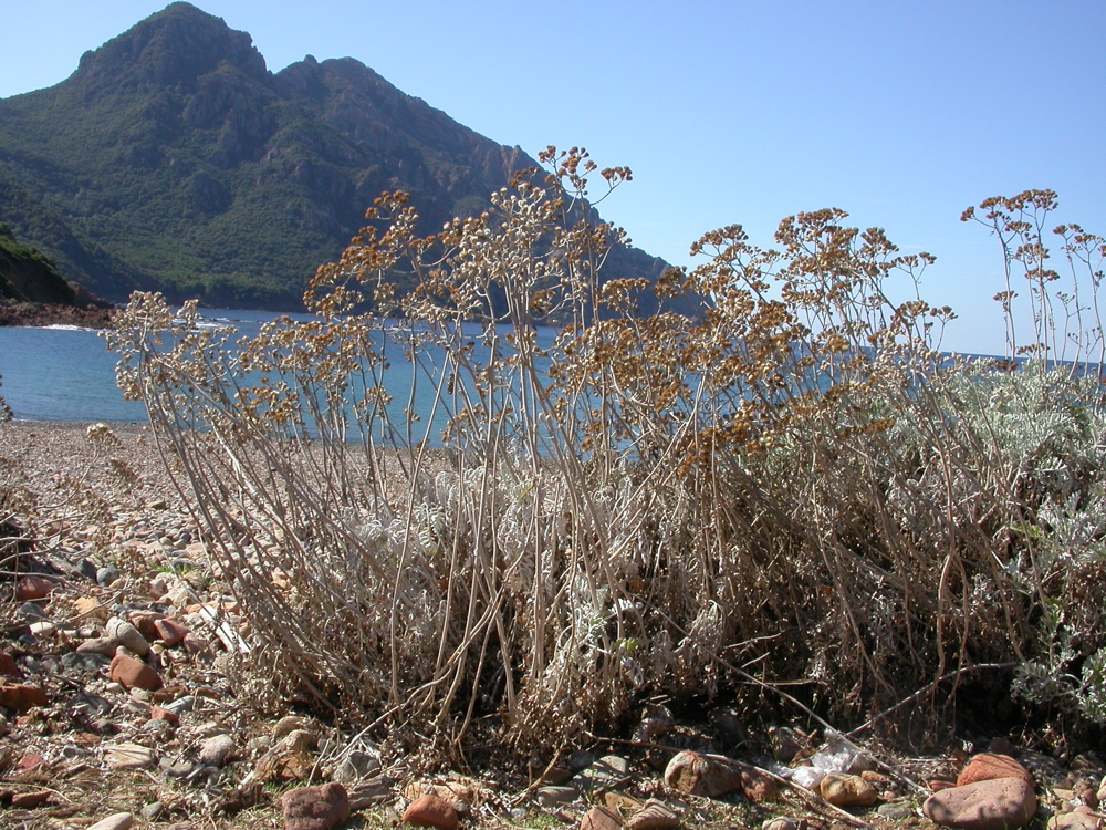 Jacobaea maritima or Senecio cineraria